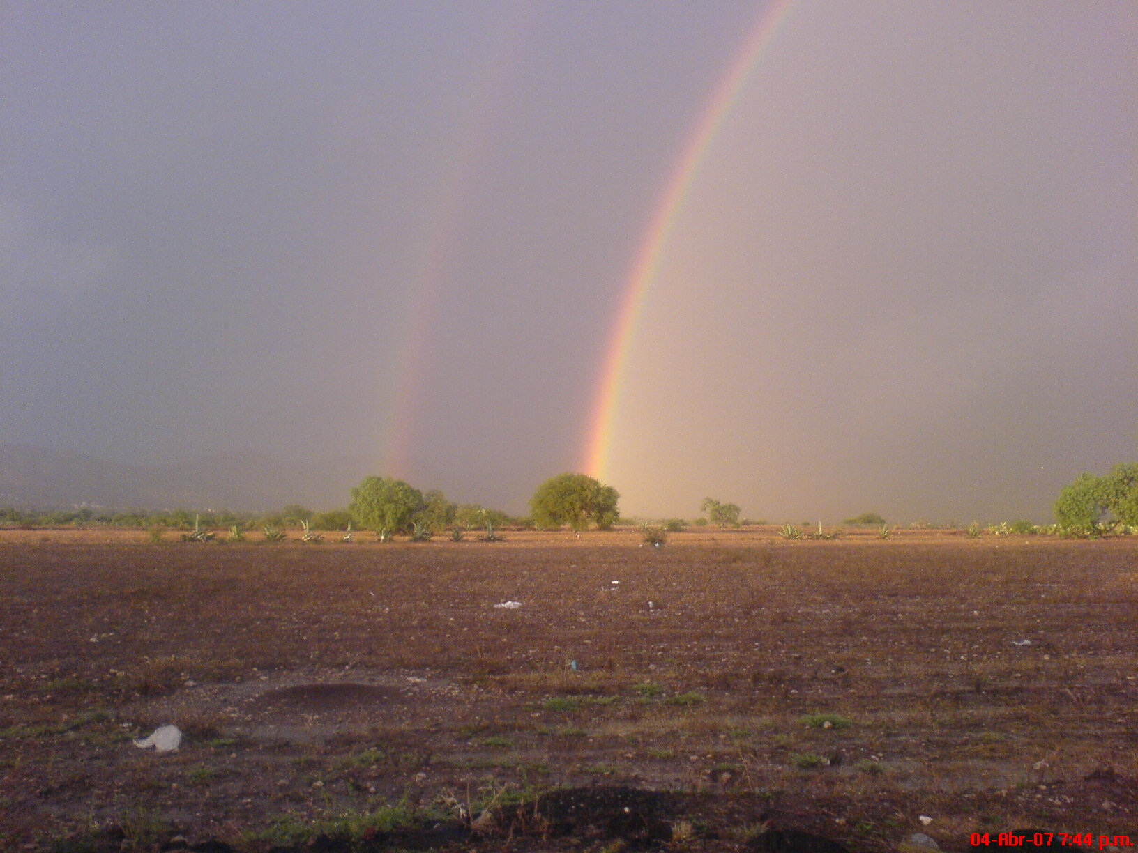 arcoiris en el valle de actopan hidalgo,mexico